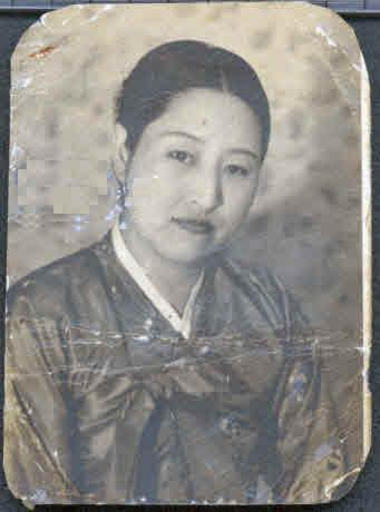 현송자